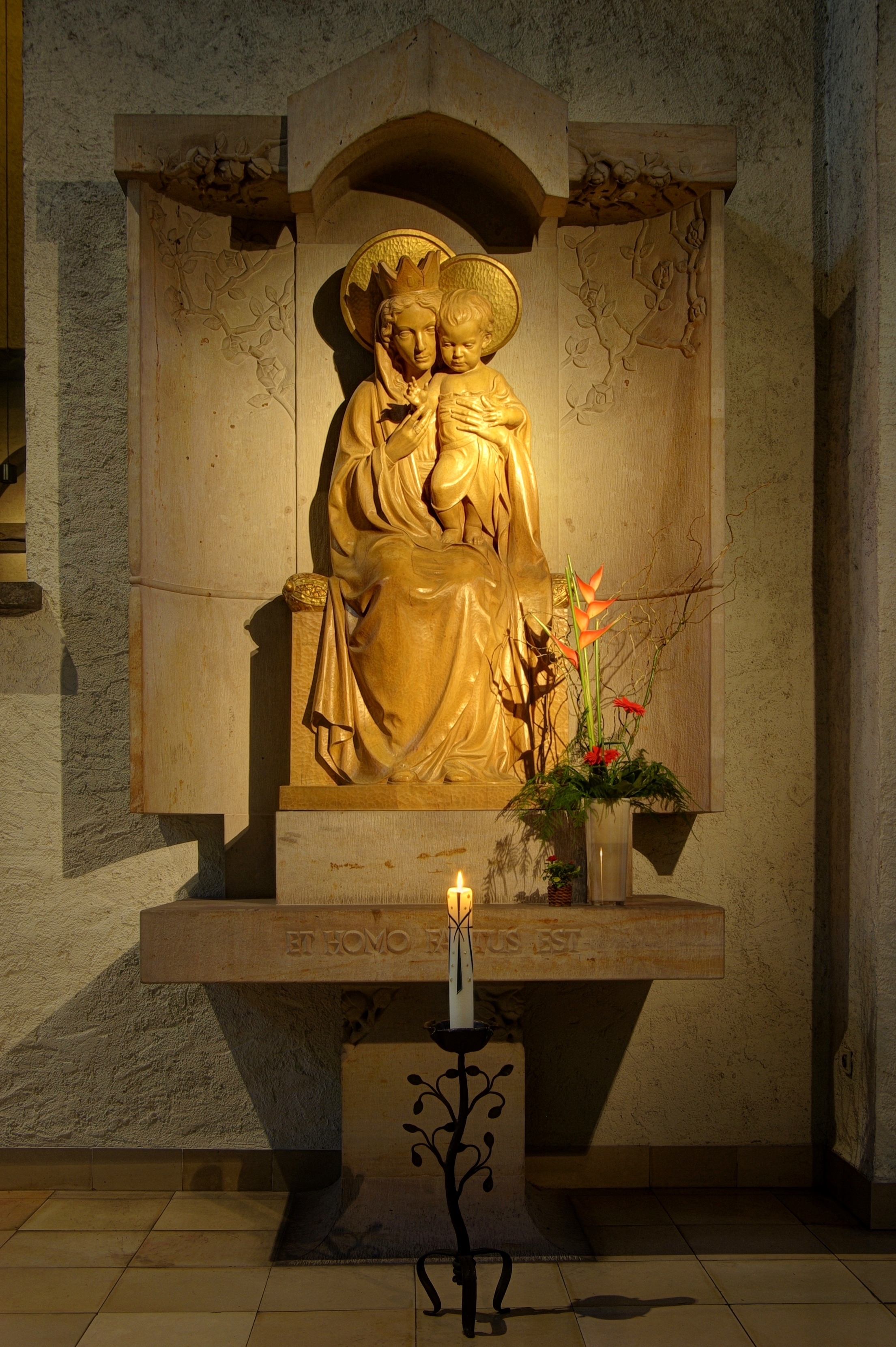 Abtei Münsterschwarzach, Madonna